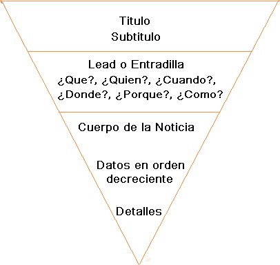 Ejemplo de Piramide Invertida, (Cuerpo de la Noticia)